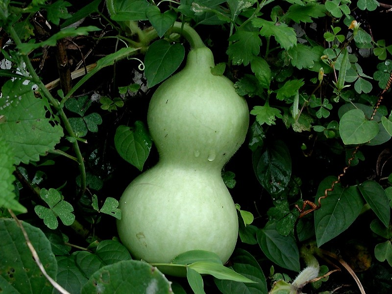 Lagenaria siceraria (Molina) Standl.